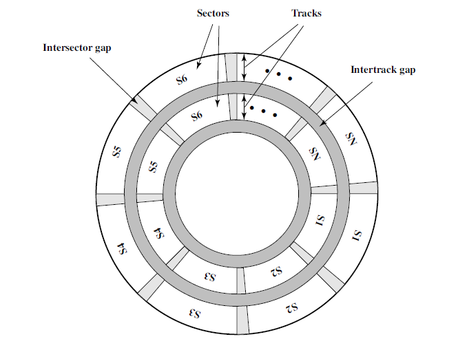 Organizimi i diskut